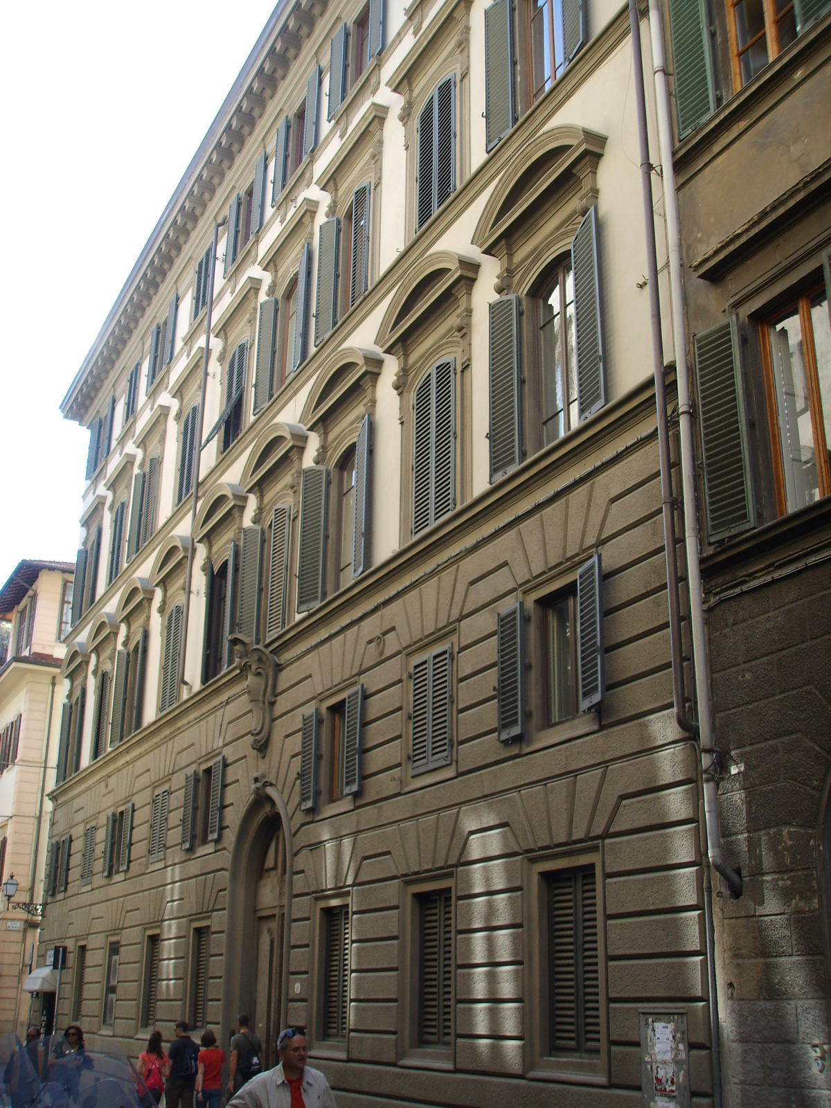 Palazzo panciatichi, retro su via ricasoli